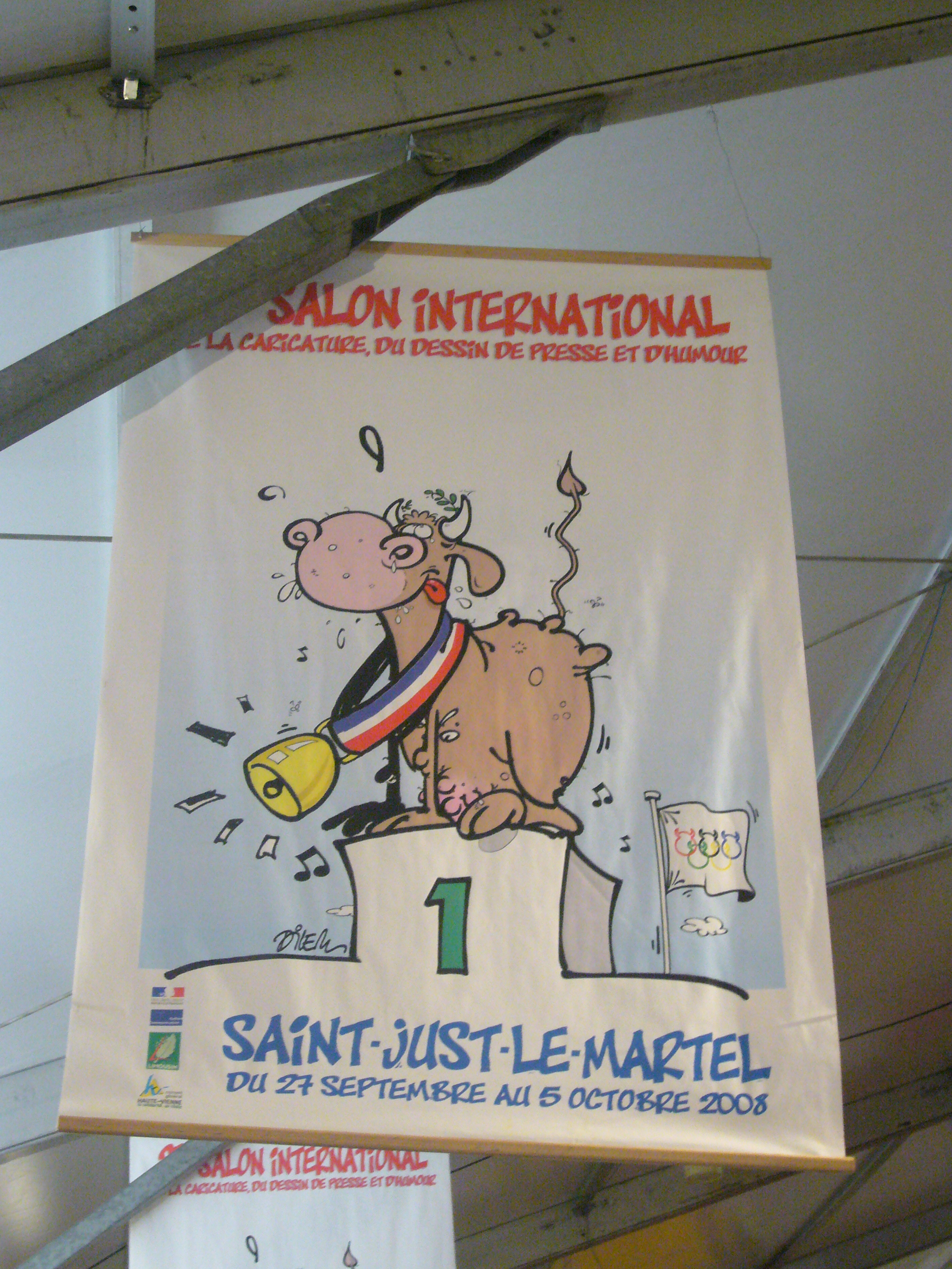 Affiche du 27è salon international de la caricature, du dessin de presse et d'humour de Saint-Just-le-Martel (87, France)